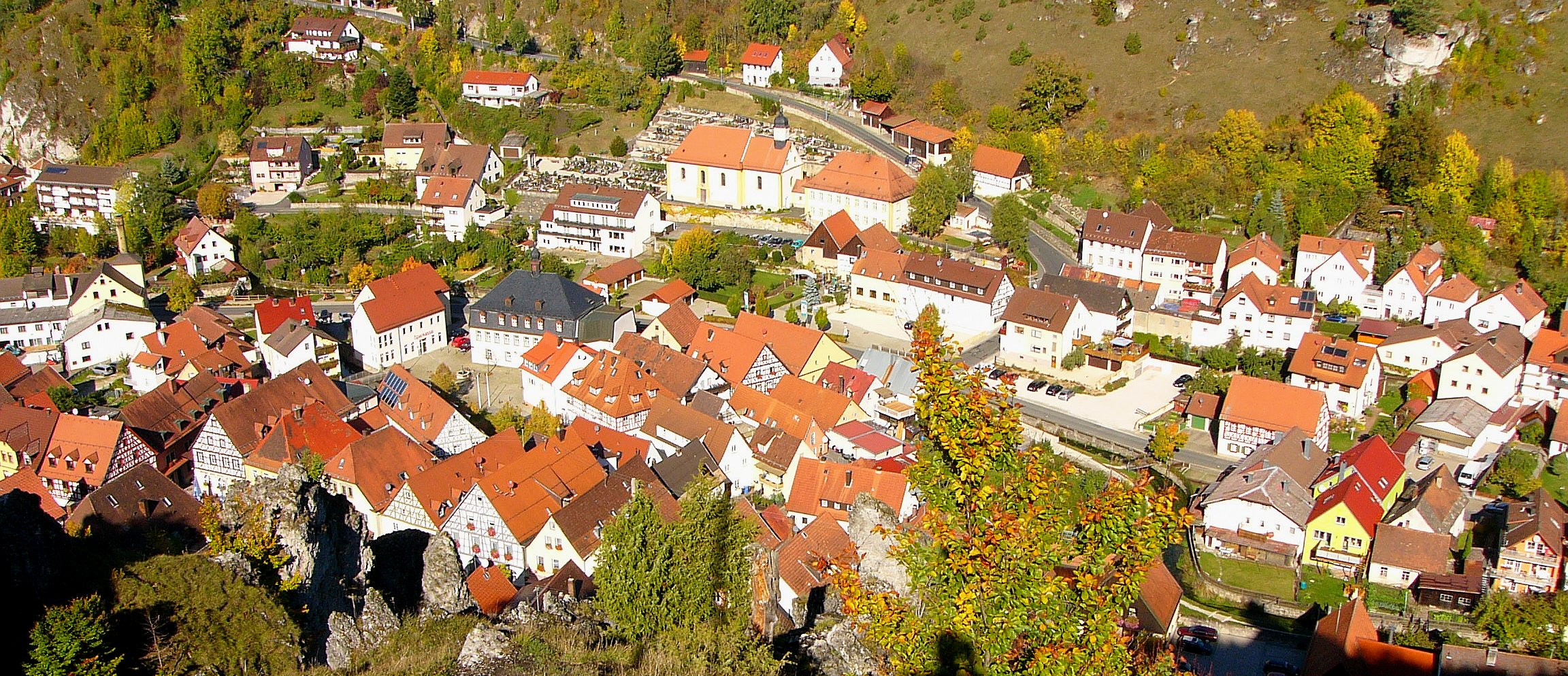 Die Burganlage und die ihr zu Füßen liegende Stadt bilden ein zusammenhängendes GanzesThis is a photograph of an architectural monument.